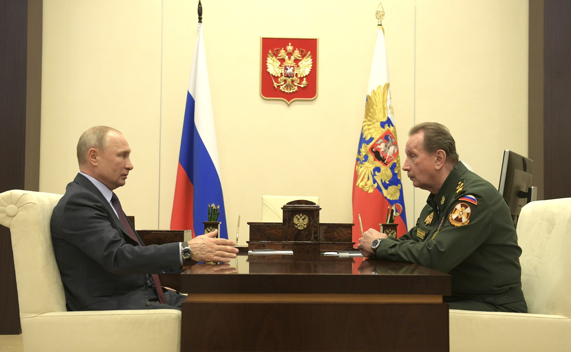 Владимир Путин провёл рабочую встречу с директором Федеральной службы войск национальной гвардии – главнокомандующим войсками национальной гвардии Российской Федерации Виктором Золотовым